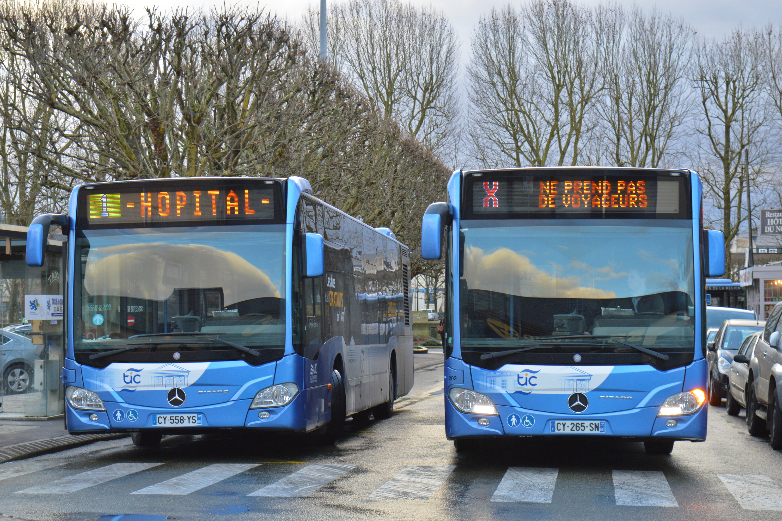 Autobus sur le réseau TIC de Compiègne